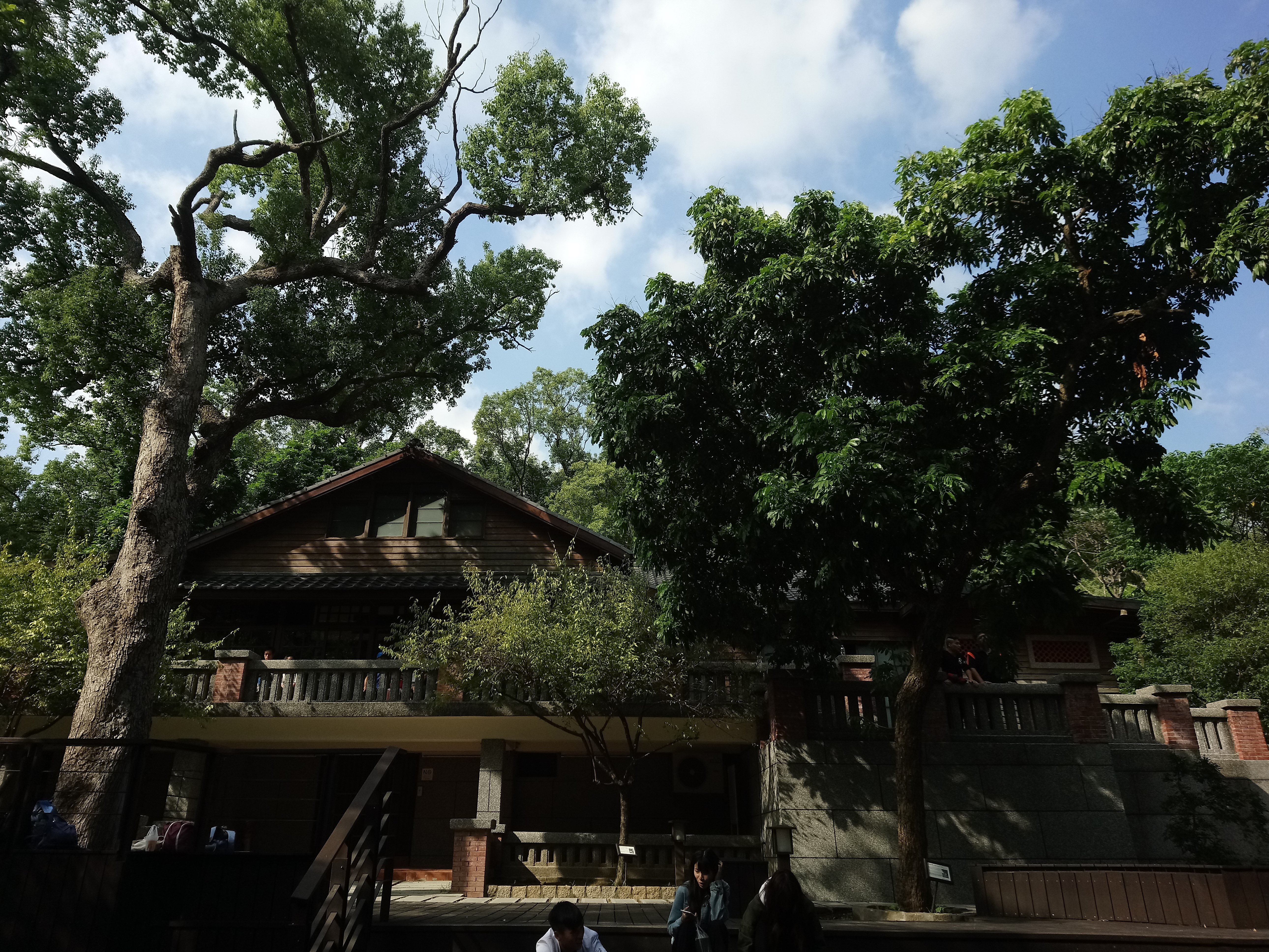 梅庭南側,臺北市北投區新北投次分區林泉里